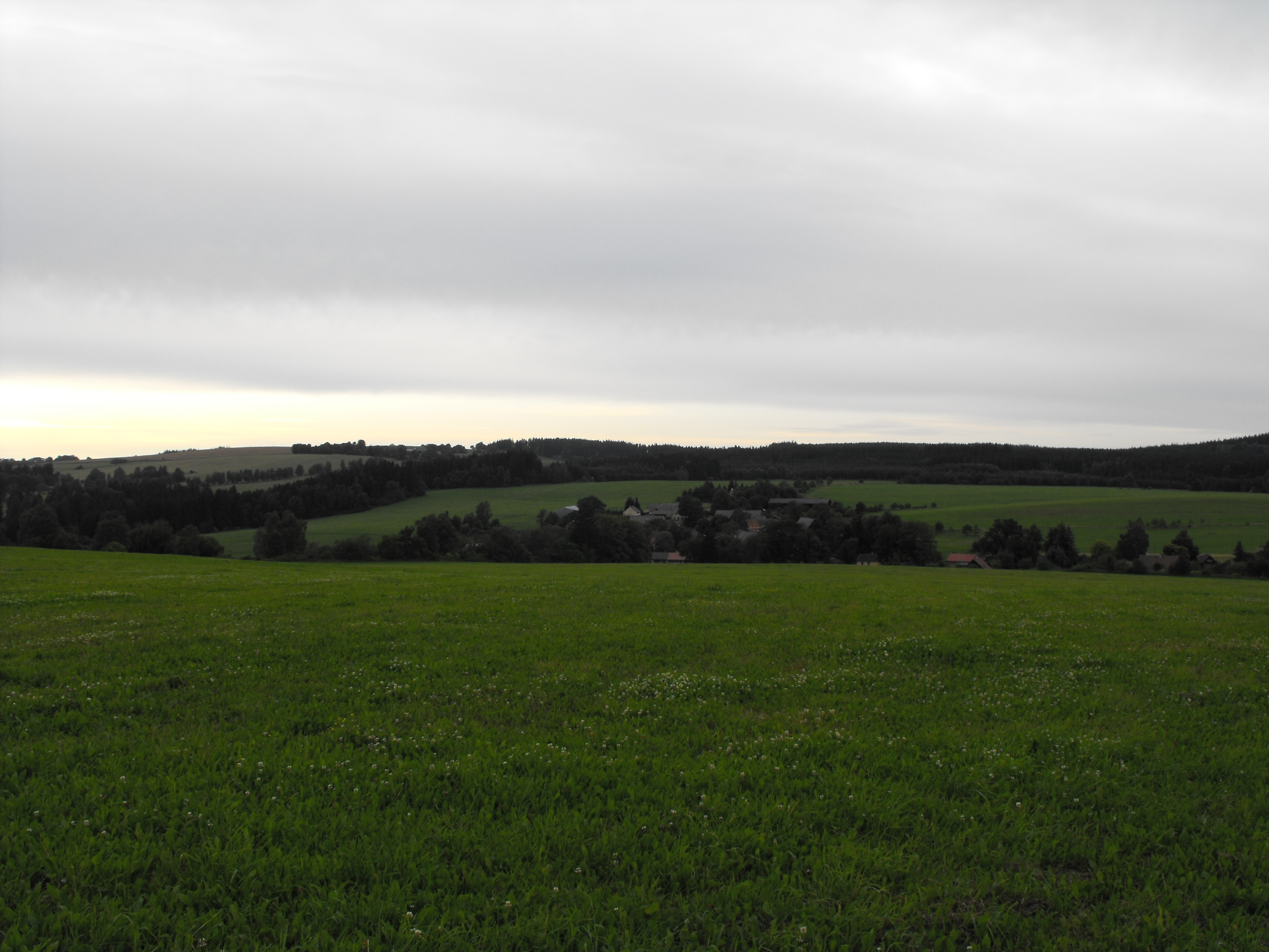 Staré Sedlo, celkový pohled